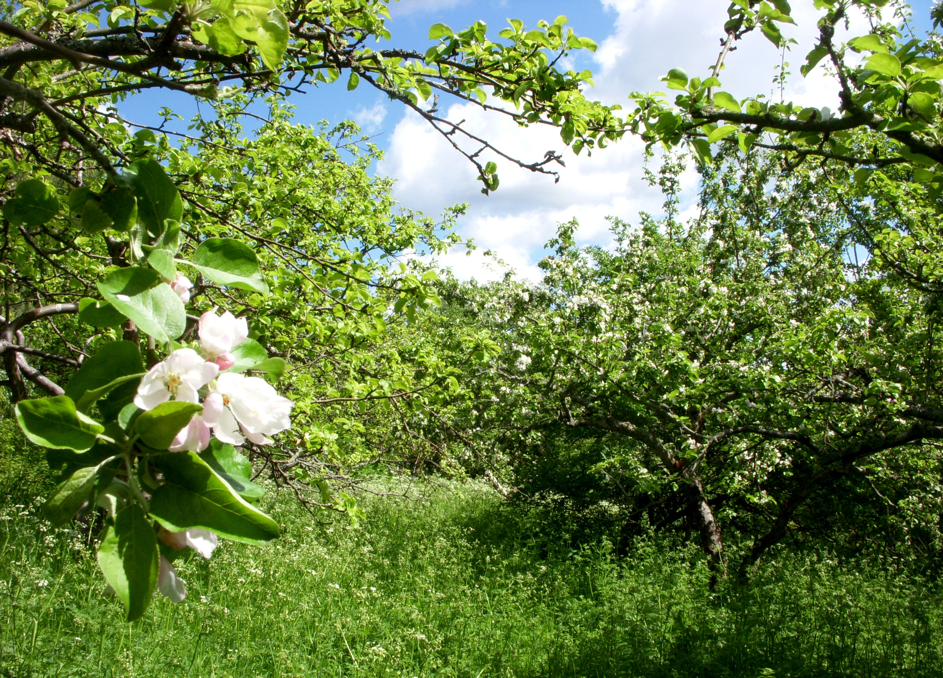 Cadiers odlingar kallas resterna av en förvildad trådgårdsanläggning i Solna